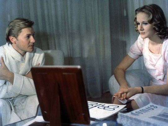 Képkocka a „Finzi-Continiék kertje” című filmből